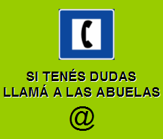 Poster de Abuelas de Plaza de Mayo, diseño del autor, texto y mensaje de Abuelas de Plaza de Mayo